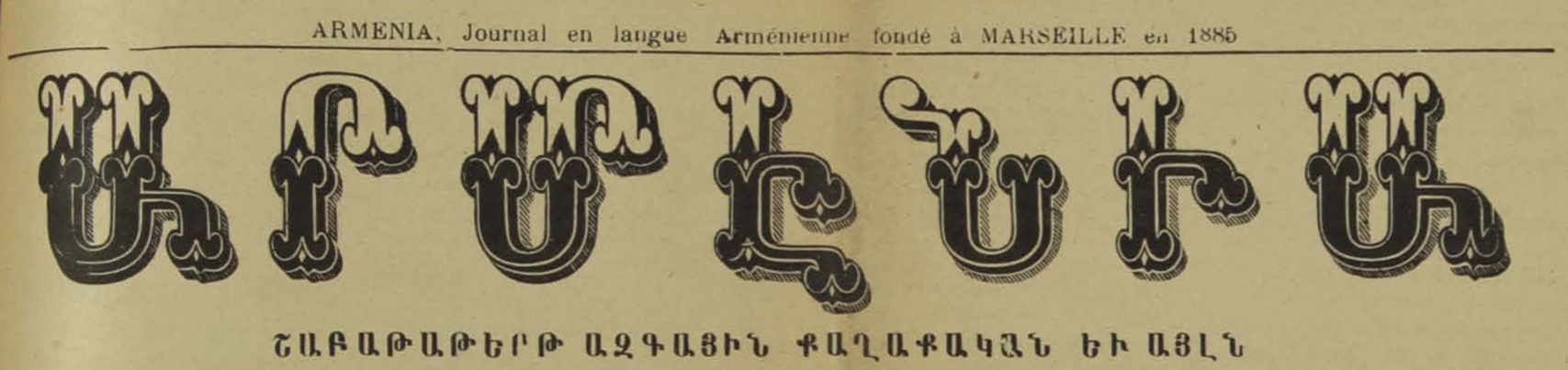 Armenia (journal, 1919)